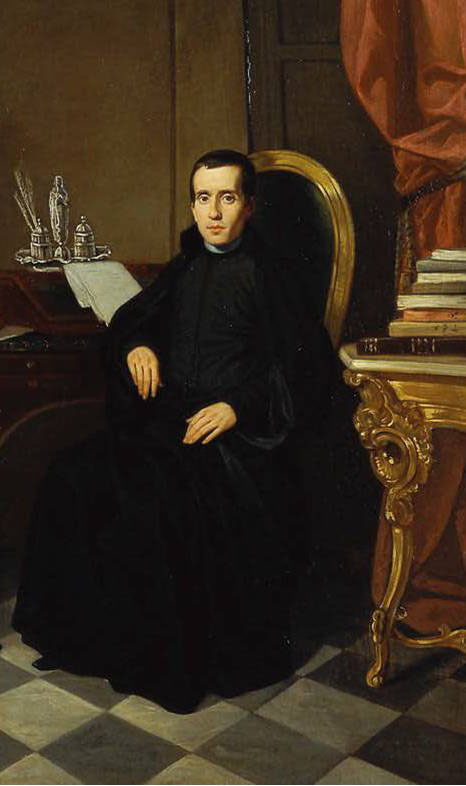 Retrato del filósofo y teólogo Jaime Balmes (1810-1848).